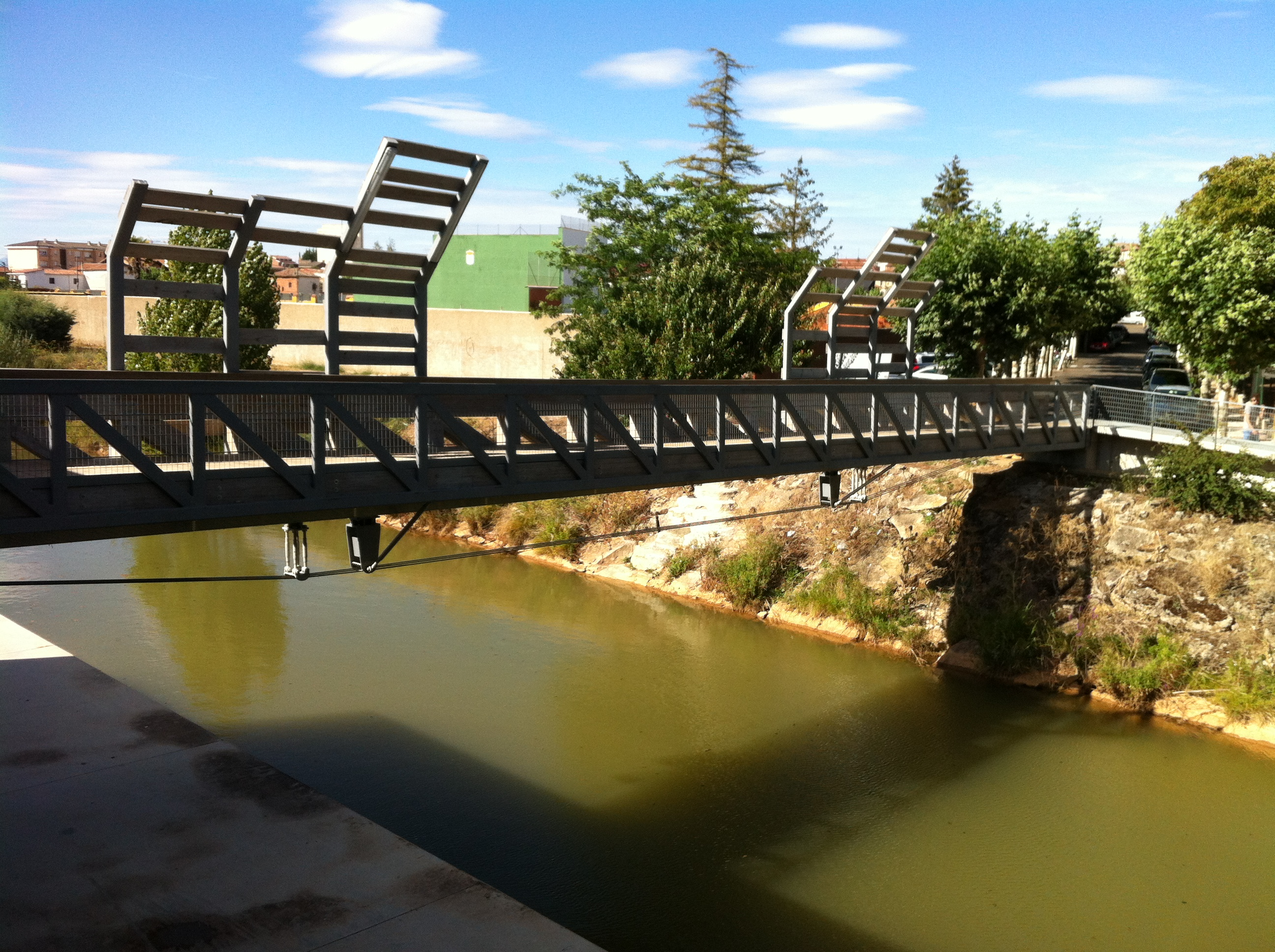 Pasarela de la Casa del Cangrejo.